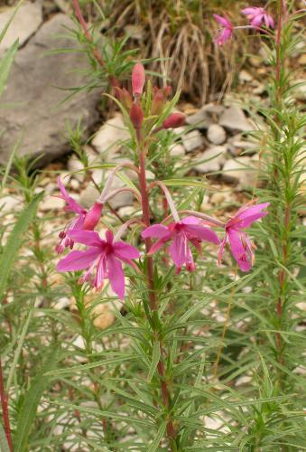 Epilobium dodonaei, Foncine, Jura, France